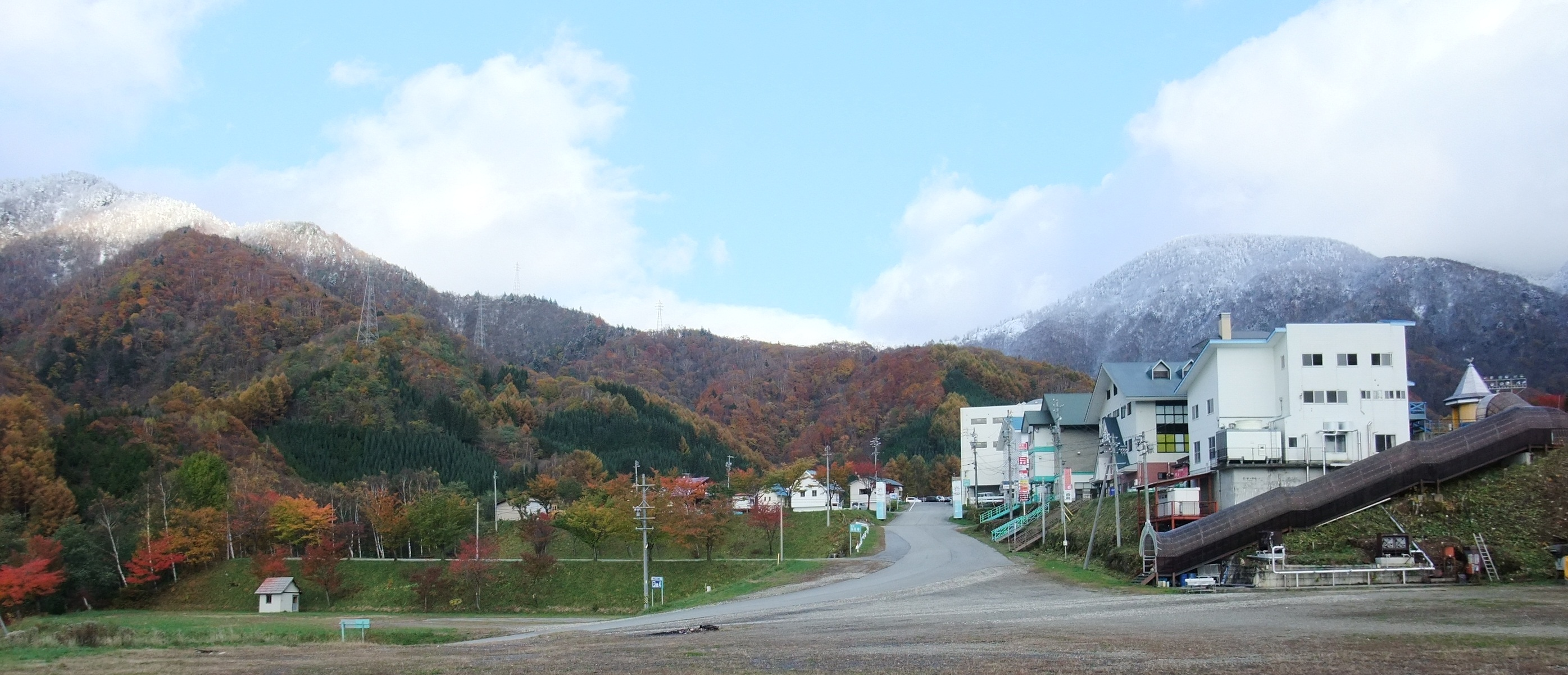 飛騨ほうのき平スキー場